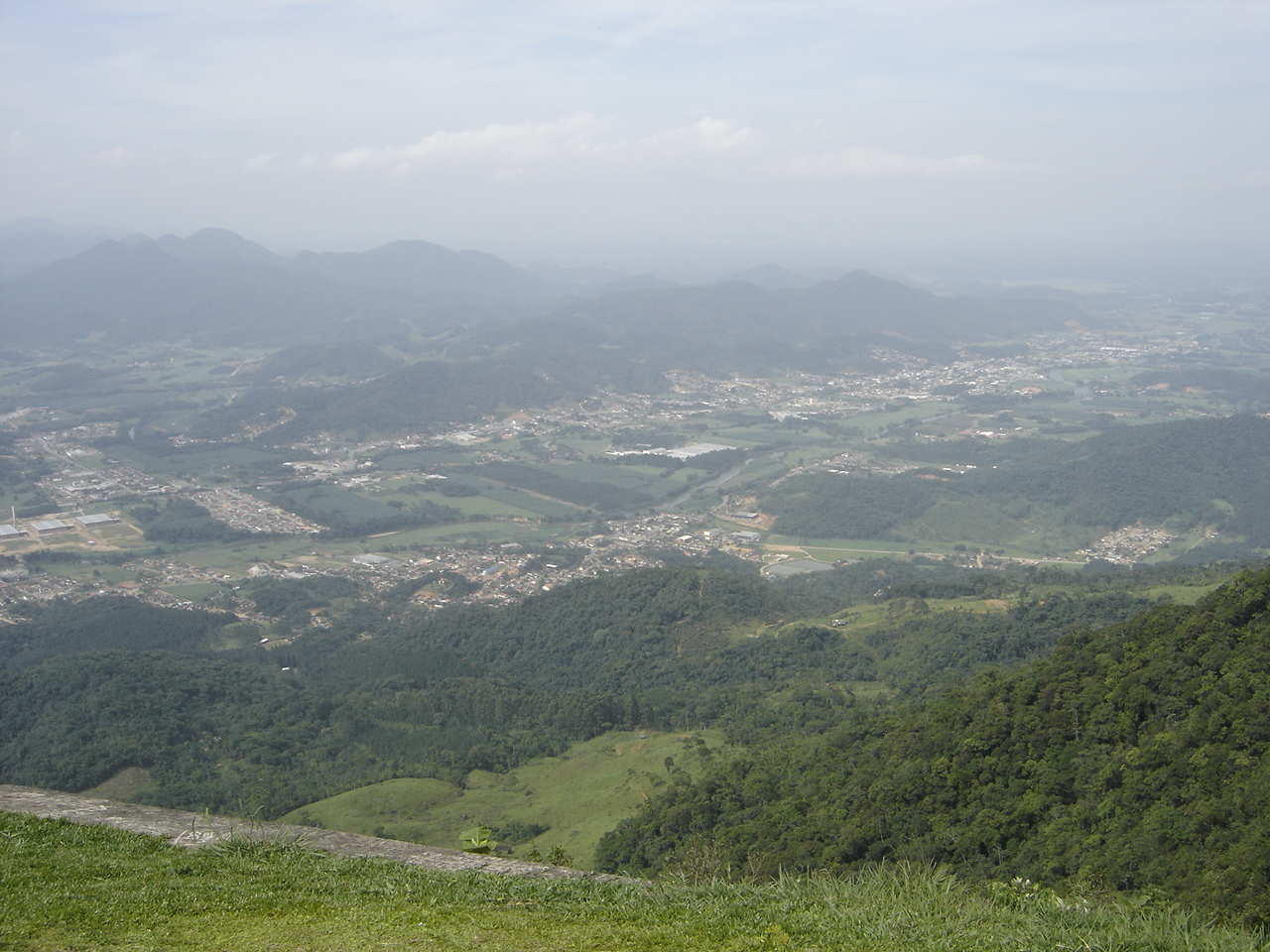 Picture of Jaraguá do Sul (Santa Catarina - Brazil) from Boa Vista Hill